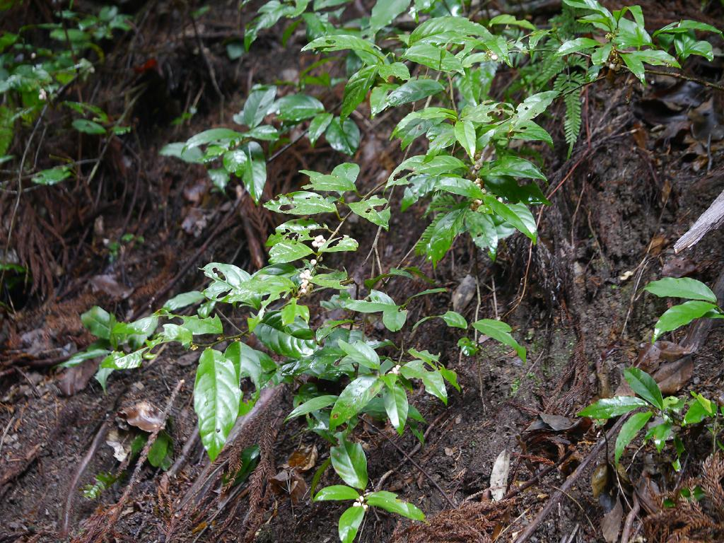 Maesa japonica：イズセンリョウ 2017/01/09 和歌山県田辺市：Tanabe City. Wakayama Pref. Japan